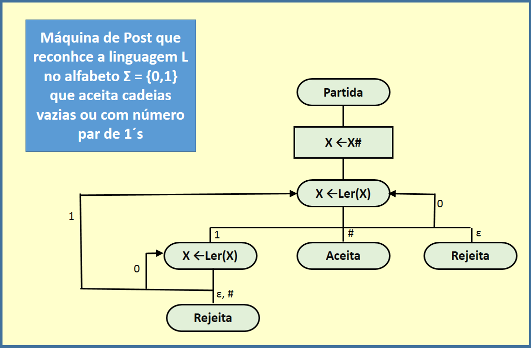 Máquina de Post que reconhece uma cedaia vazia ou com número par de 1´s